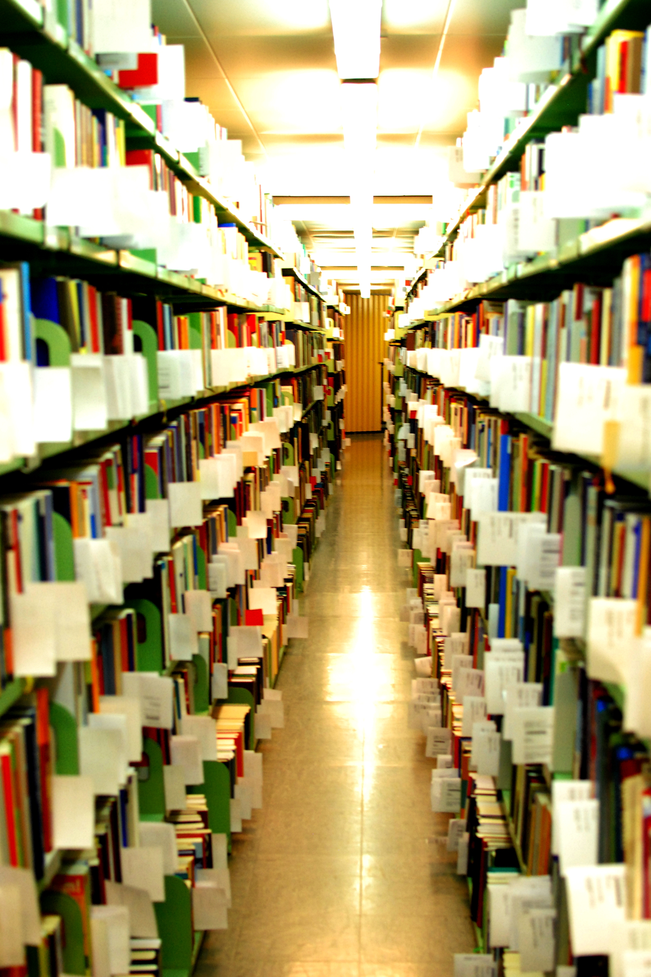 Buchregale im Tiefspeicher der Universitätsbibliothek Salzburg, Österreich, mit Entleihzetteln (weiß) und Fehlzetteln (rot).